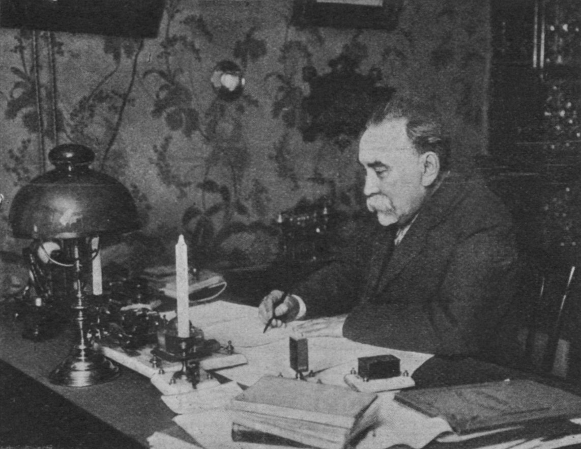 Н. А. Скроботов за своим рабочим столом в редакции газеты «Петербургский листок» (к 40-летию непрерывного участия в «Петербургском листке» и 25-летию редактирования этой газеты, 1-г декабря с.г.). Со снимка спец. фотографа журнала «Огонёк».